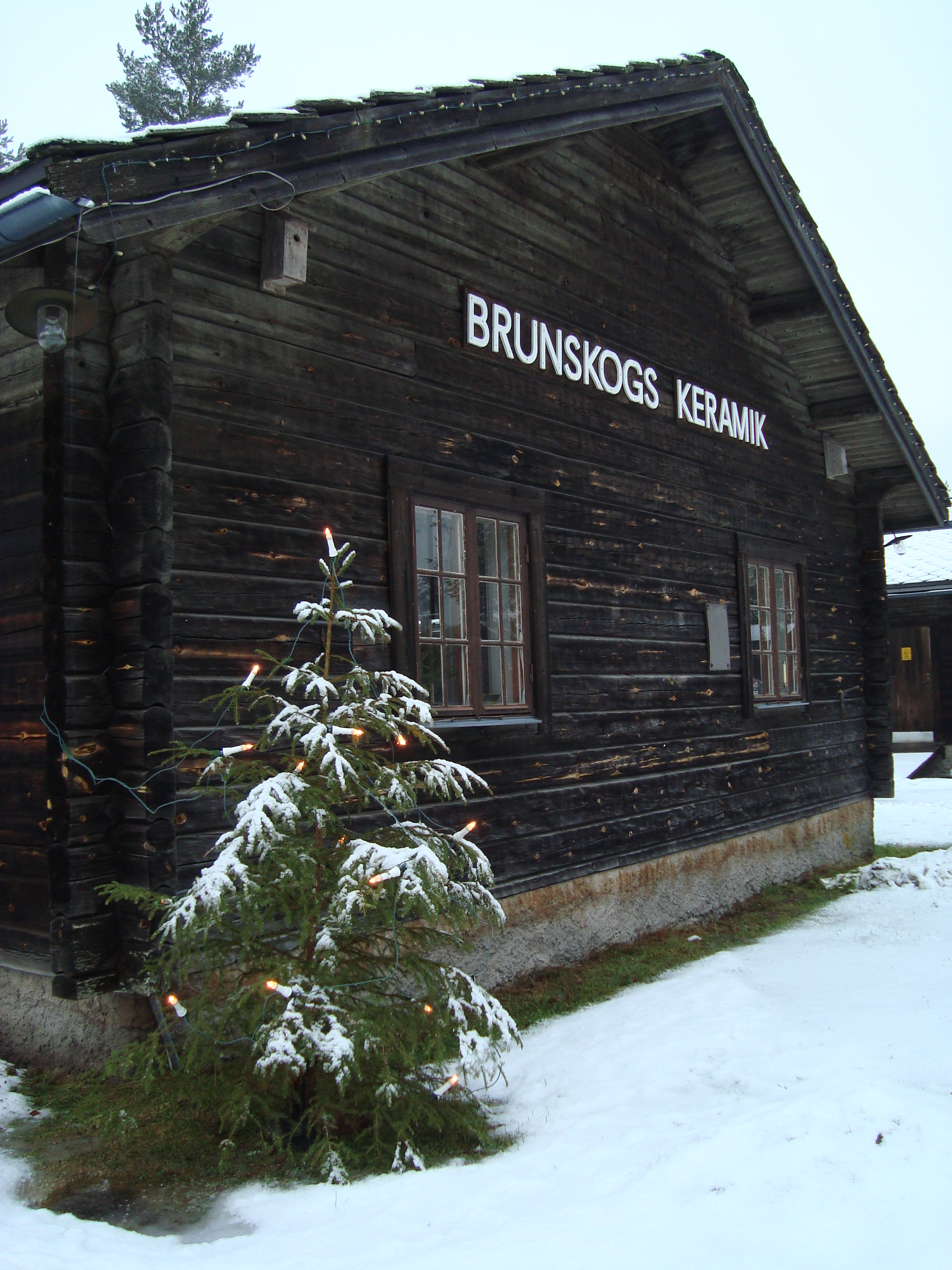 Brunskogs Keramiks verkstad.